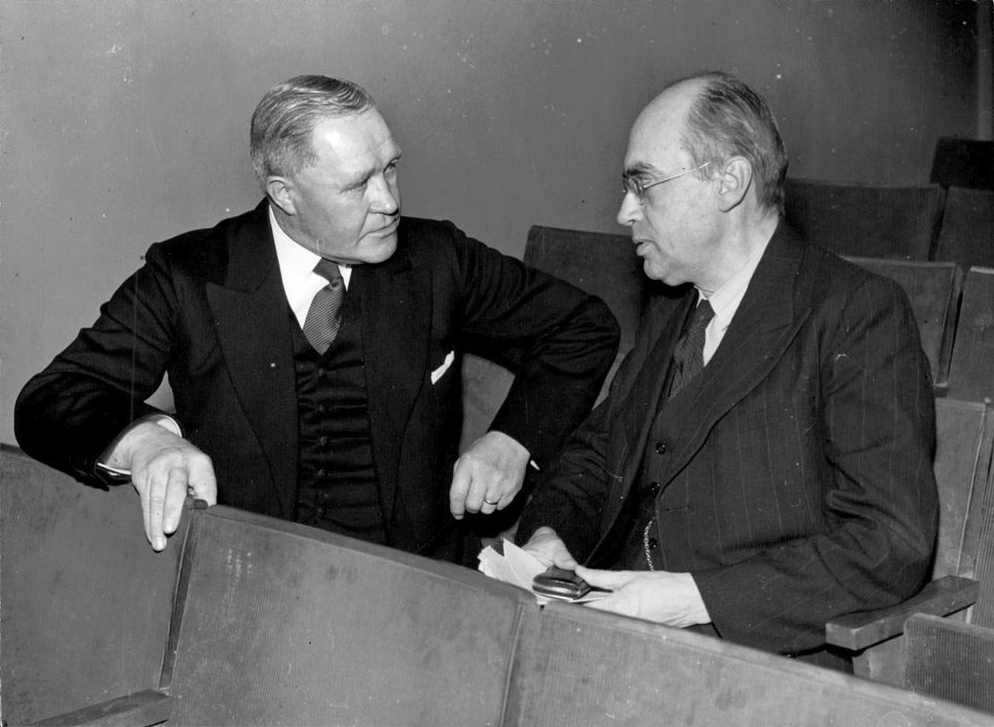 Gottfrid Jansson och Dick Helander vid KFUM:s årsmöte 1947.